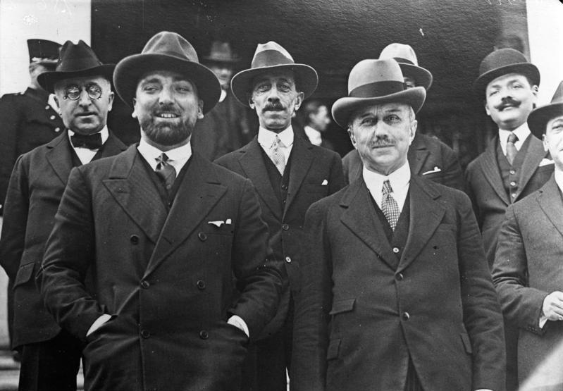 Der italienische Aussenminister Grandi, tritt für gänzliche Streichung der Reparations-Zahlungen ein ! Aussenminister Grandi welcher auf der Lausaner-Reparations-Konferenz, mit den Worten: "Schwamm darüber" eine Auslöschung der Reparationszahlungen verlangte. Information added by Wikimedia users.*